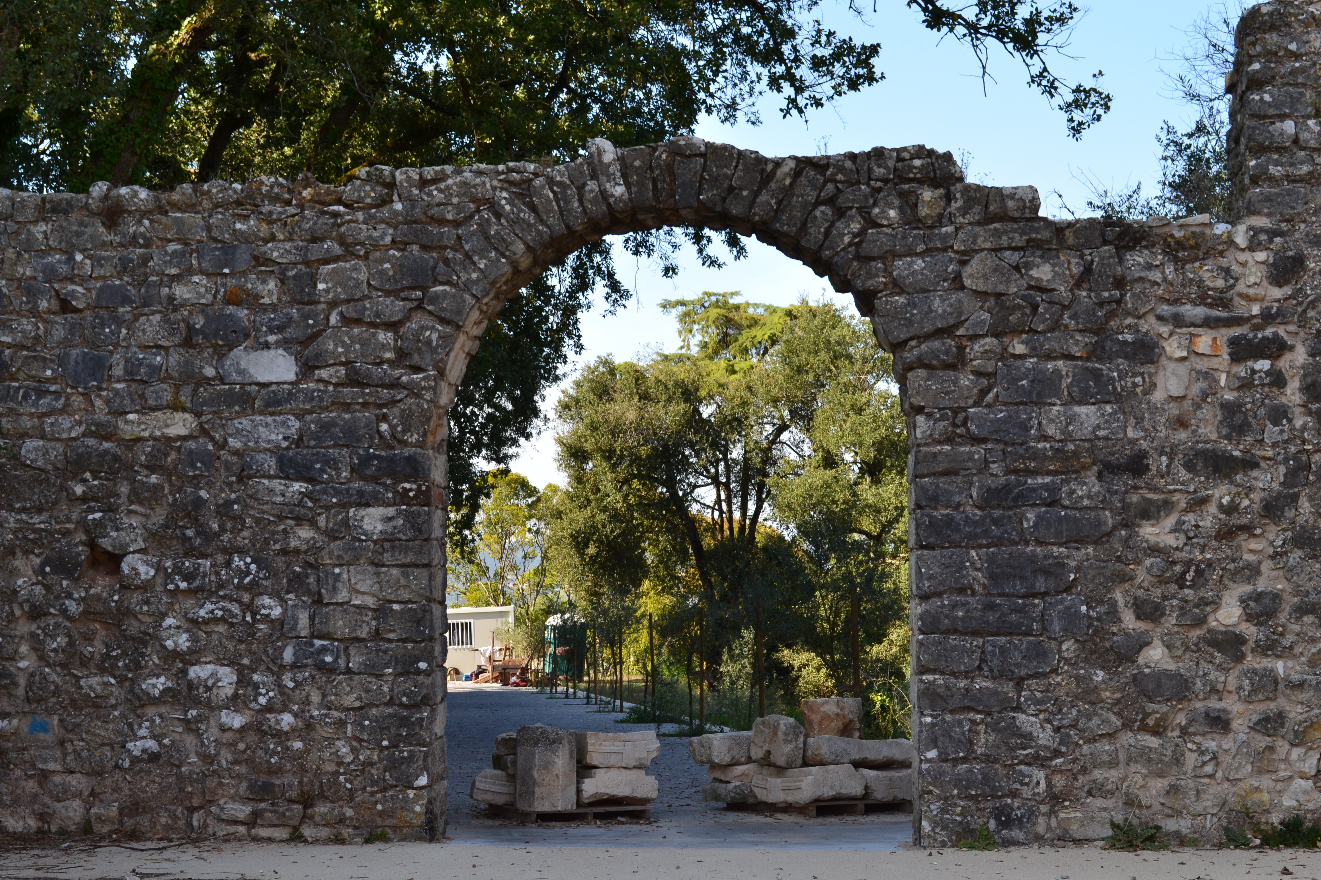 Castelo de Pombal This file was uploaded for Wiki Loves Monuments in Portugal with the unique identifier 71165.